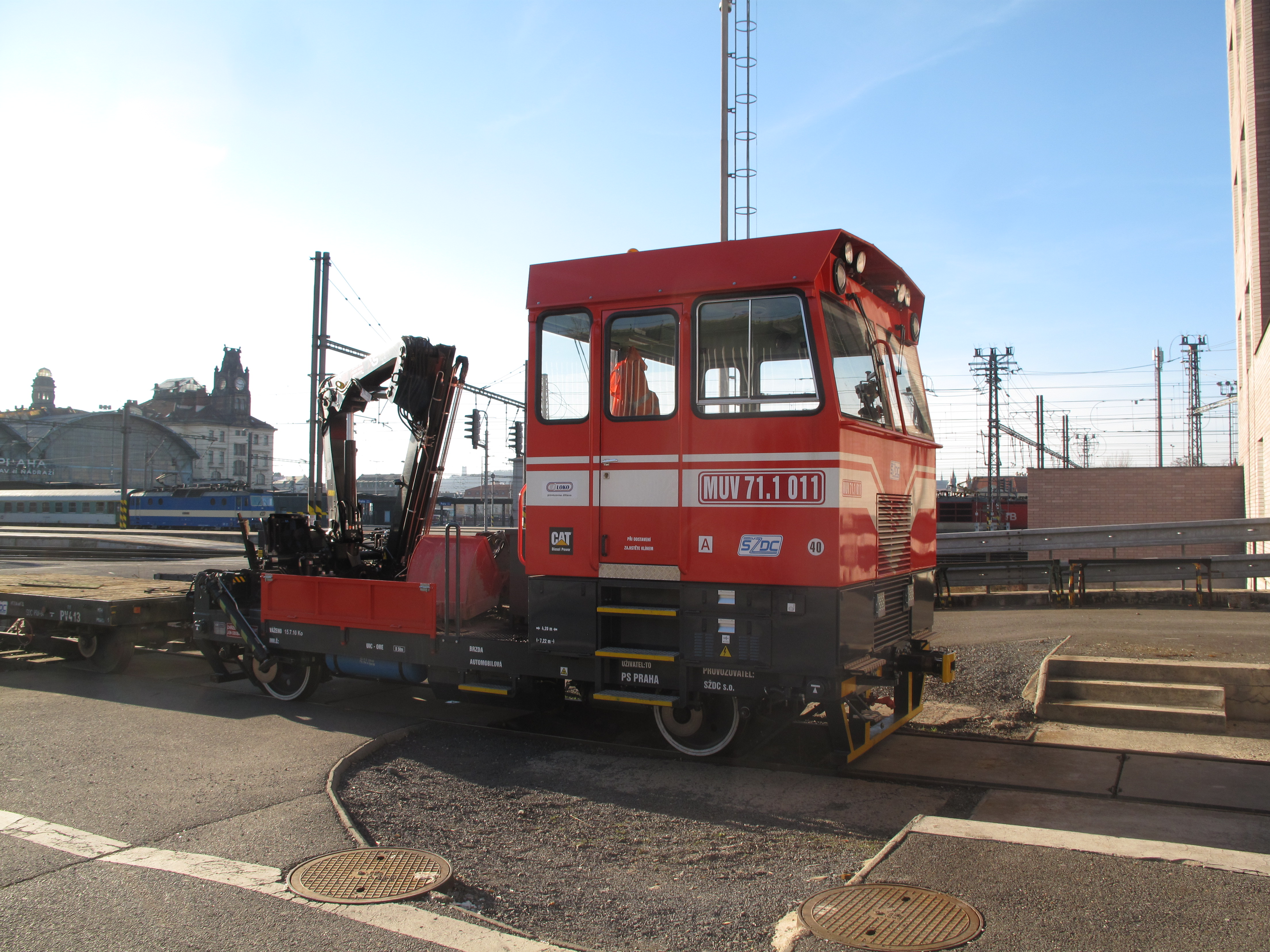 Praha hlavní nádraží, MUV 71.1 011